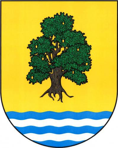 znak, Čížkov, okres Plzeň-jih